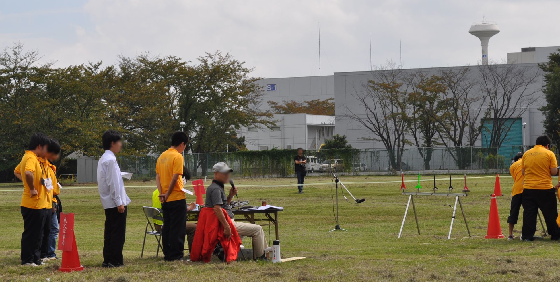 日本（筑波宇宙センター）で行われたモデルロケット全国大会の様子。参加者や主催者の顔が明瞭に写っていたのでプライバシー処理済み。